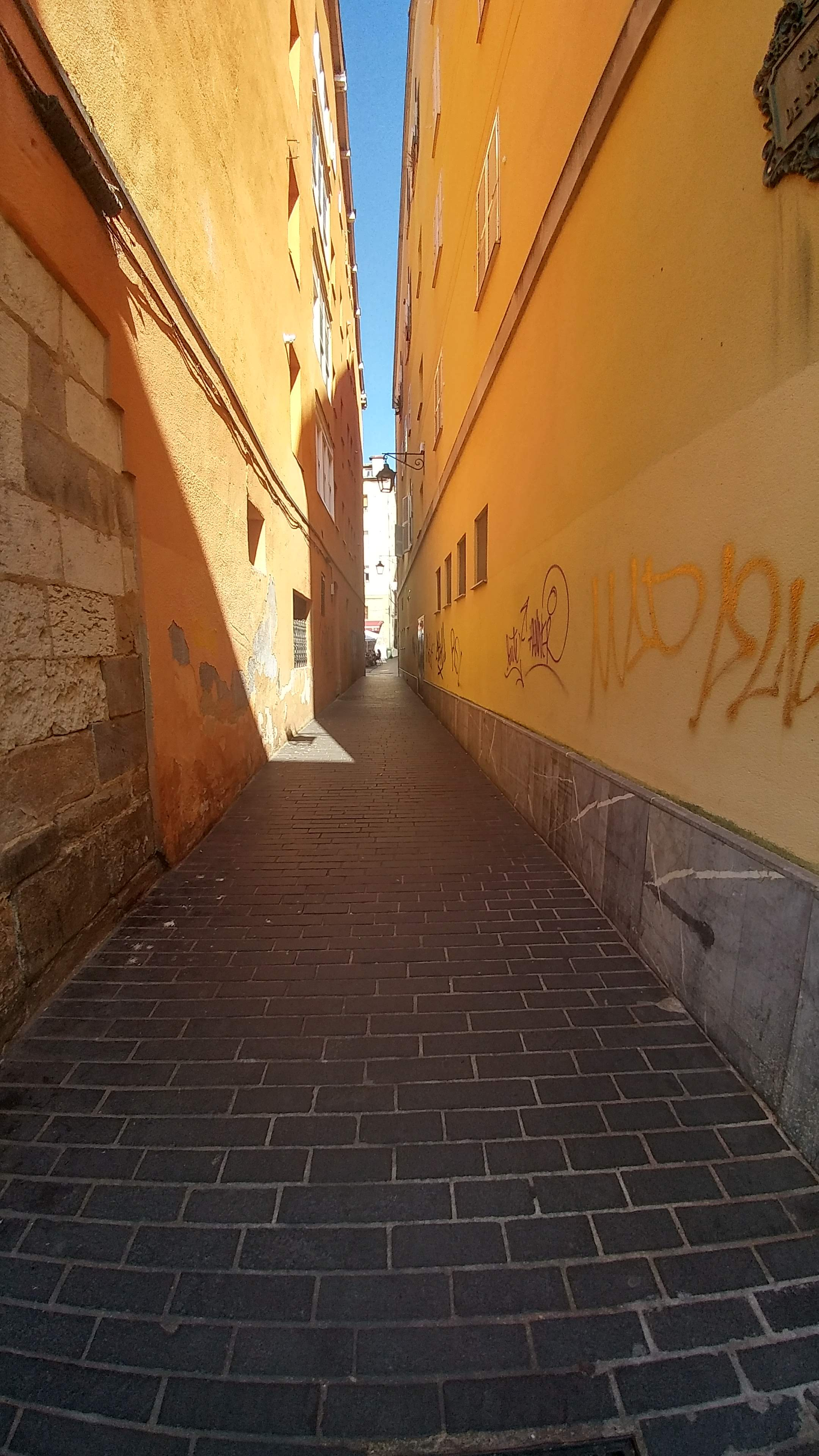 Gasteizko San Roke kantoia Diputazio kaletik